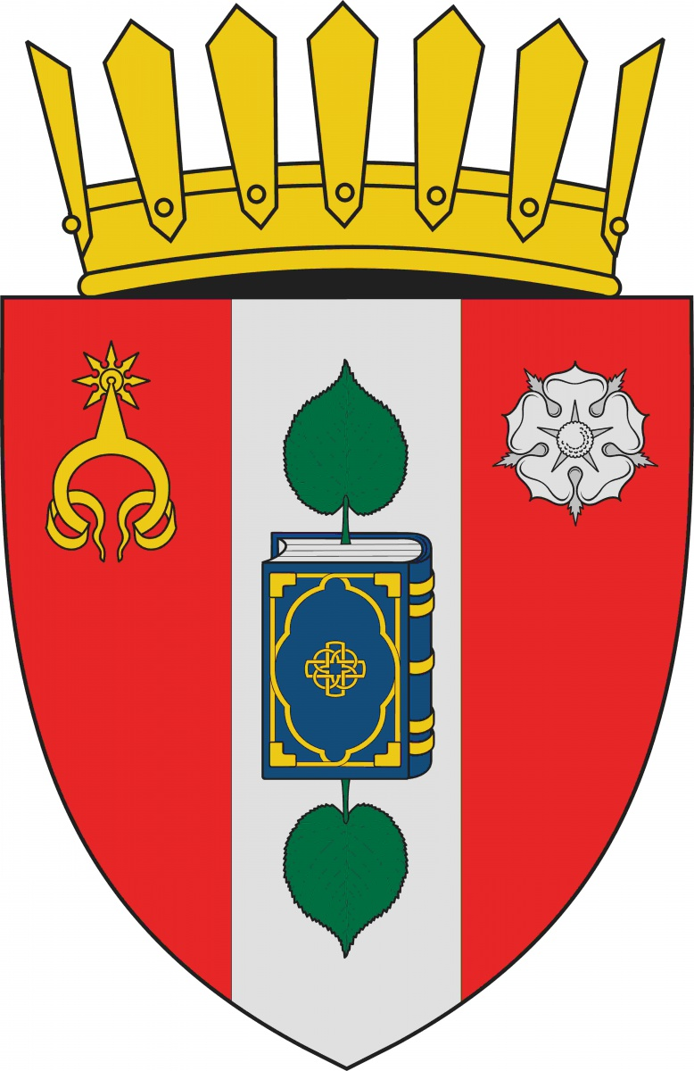 Stema satului Larga